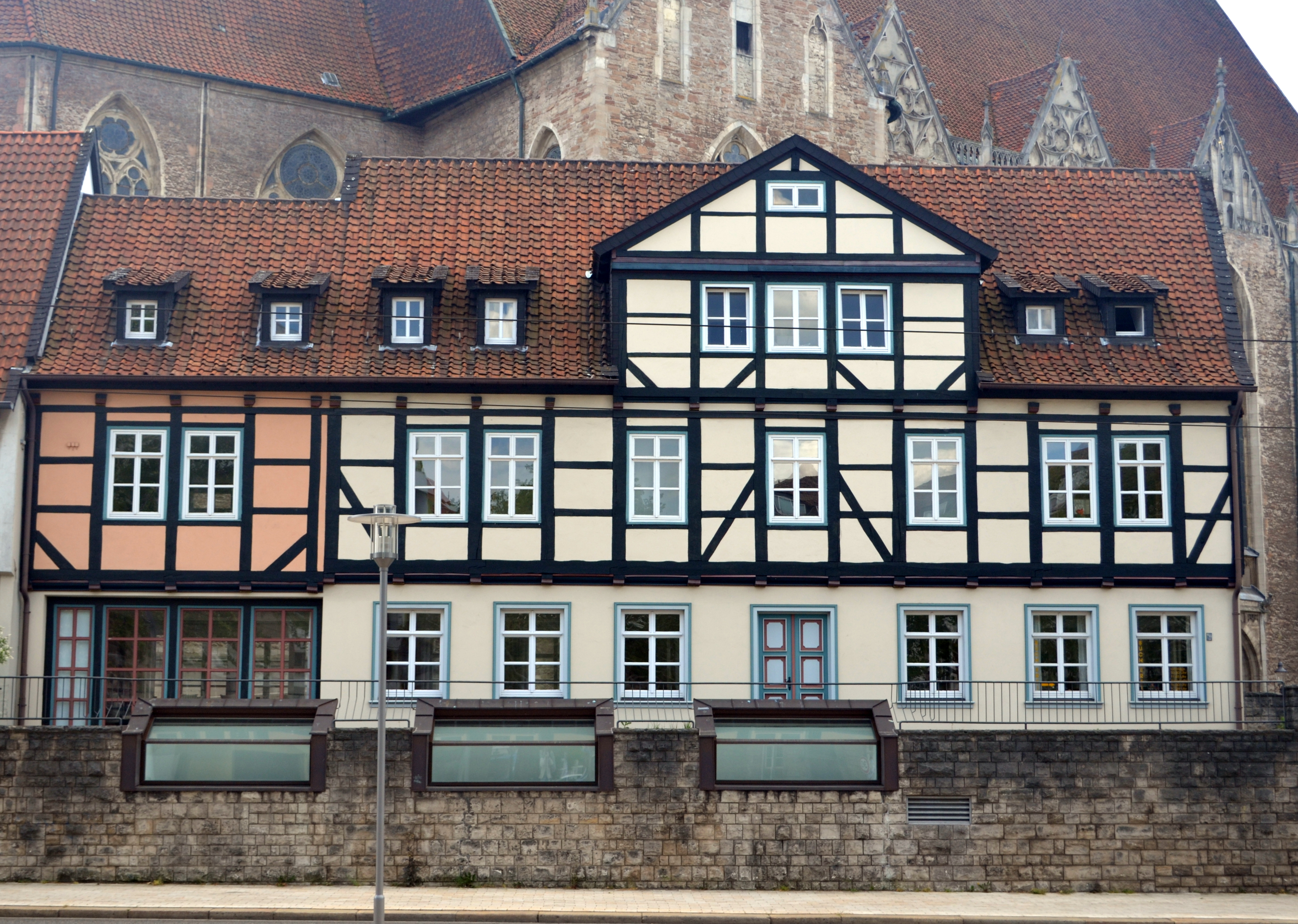 Braunschweig: Leisewitz-Haus, erbaut 1680 (Wallstraße 8), 1979 umgesetzt (Aegidienmarkt 12), Ansicht von der Auguststraße.